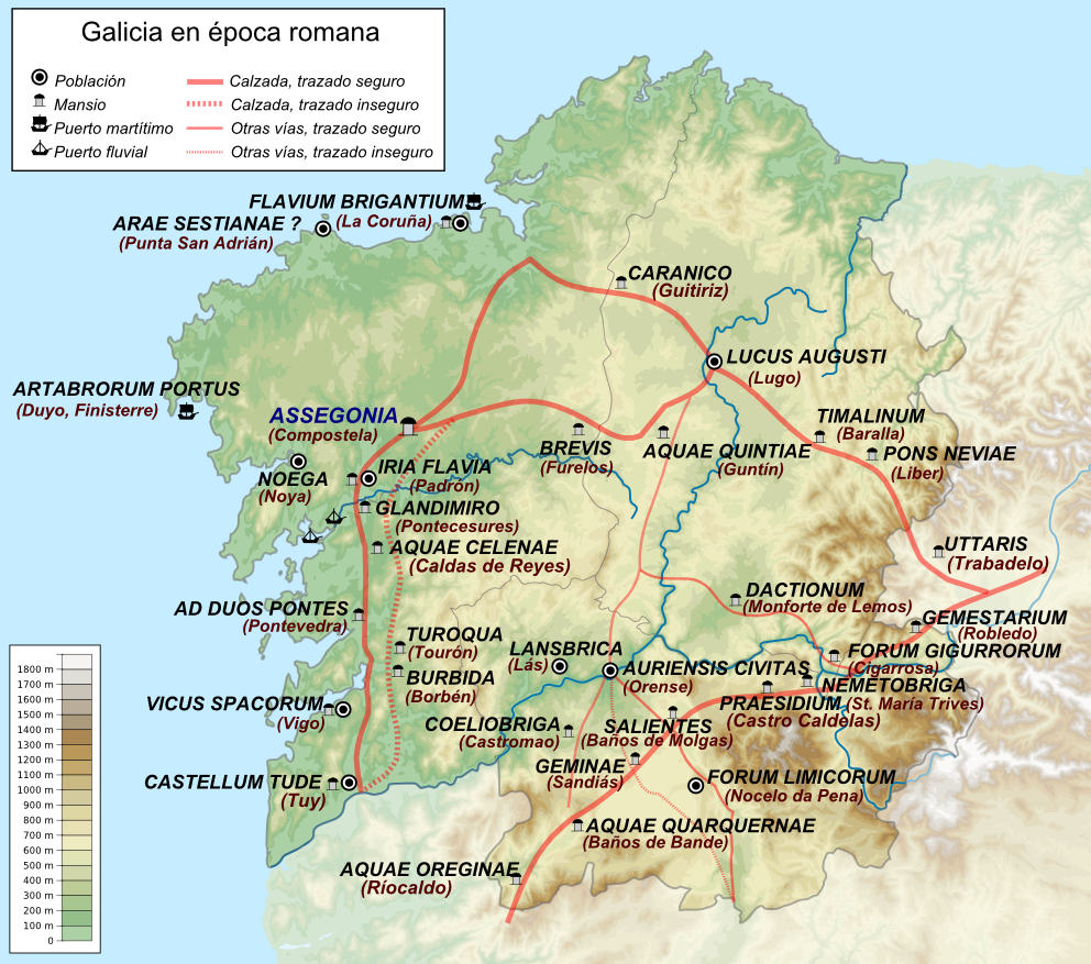 Mapa de localización de Assegonia Basado en el mapa